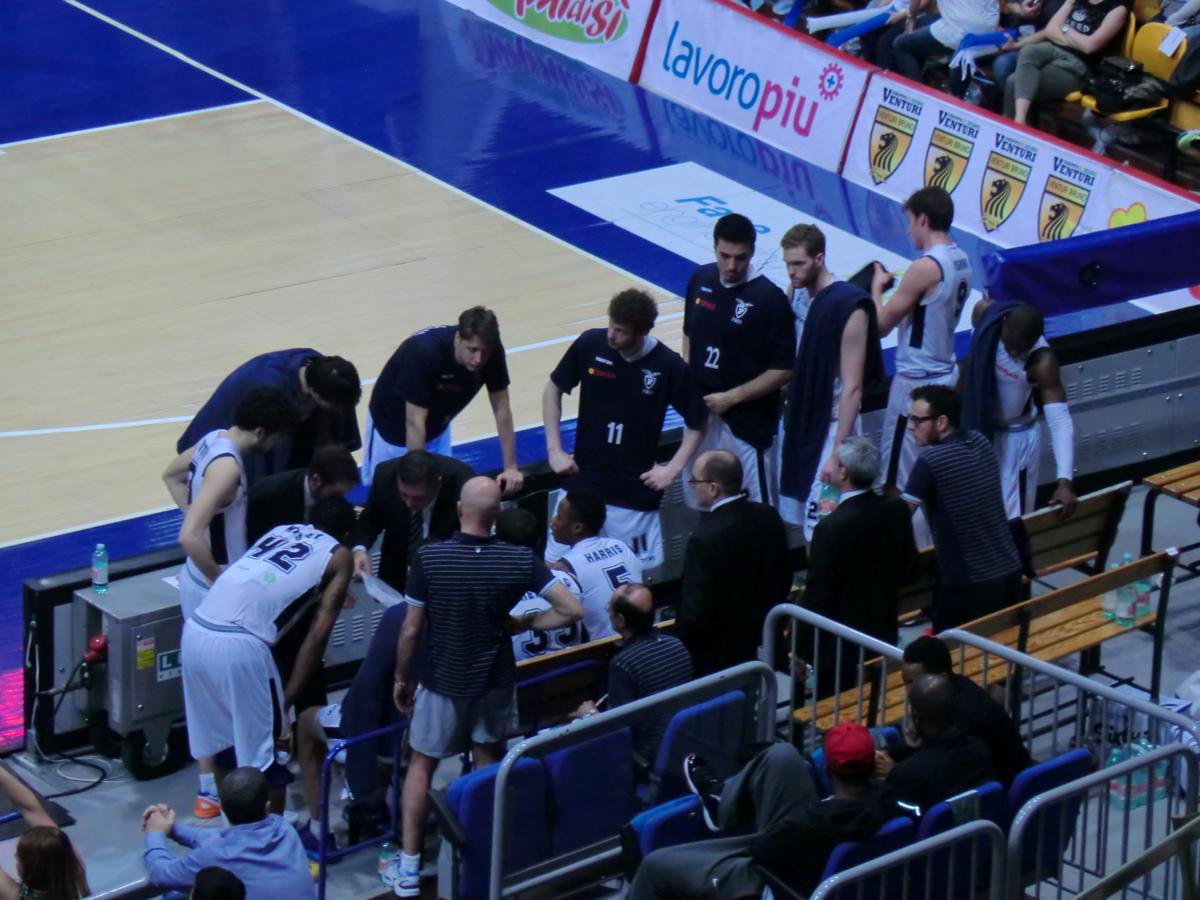 Alcune immagini scattate in occasione dell'incontro di LegaDue tra Bologna e Forlì al PalaDozza di Bologna.